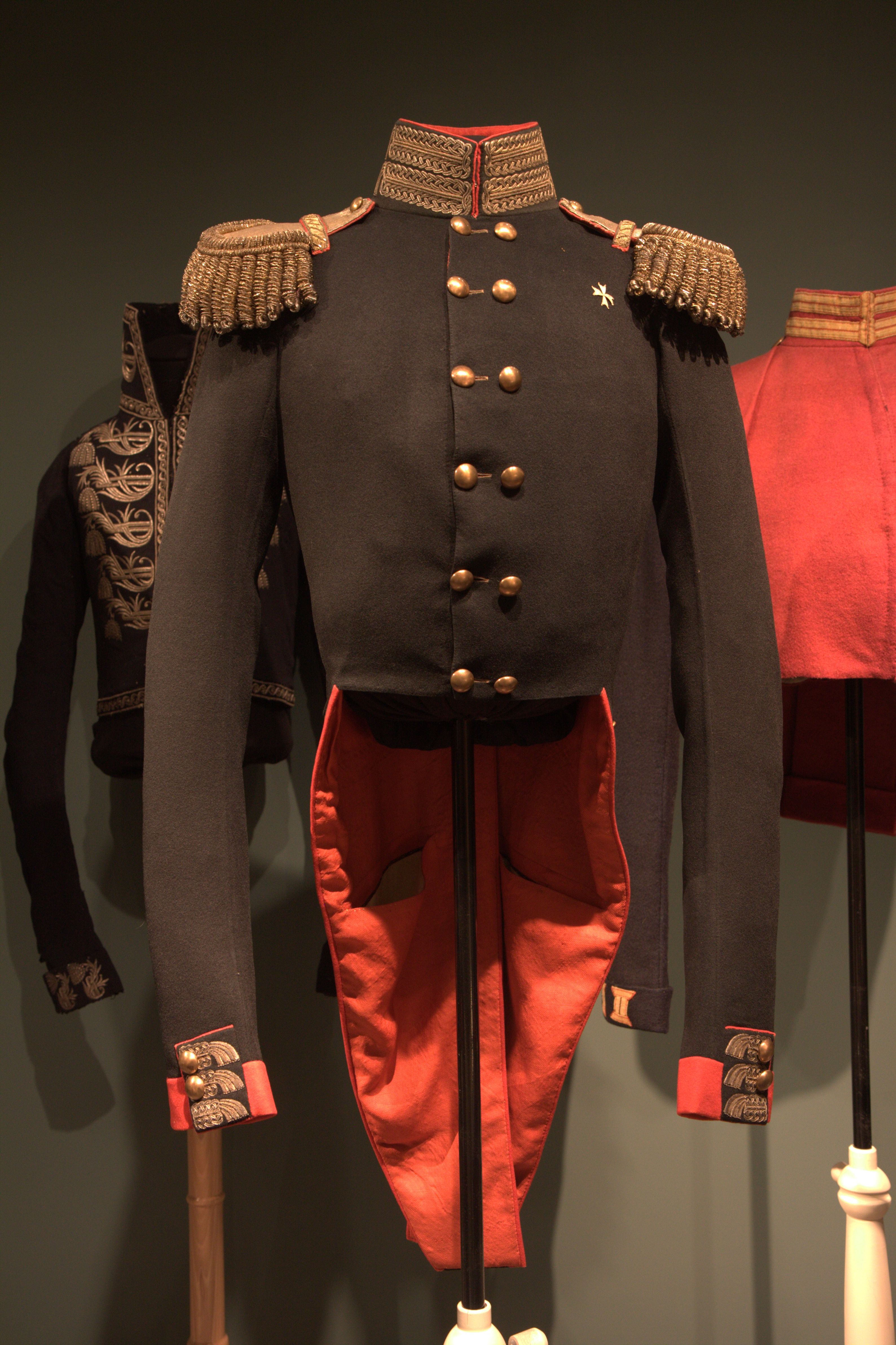 Uniforme d'officier avec épaulettes du régiment Izmaïlovsky de la garde impériale. Cet uniforme date des années 1812-1817.